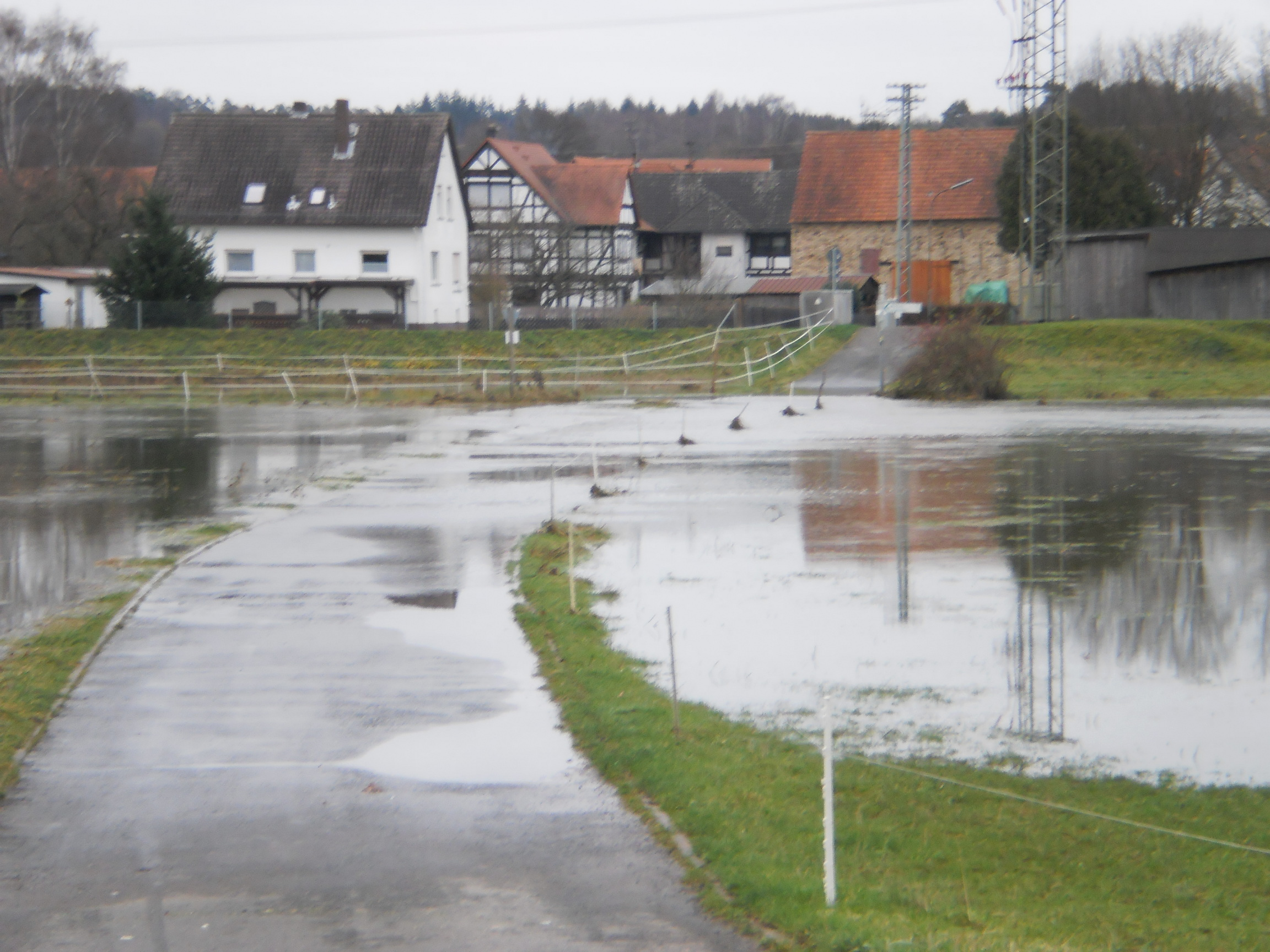 Flutmulde für das Hochwasser von Lahn und Allna in Weimar-Roth. Am 2. Dezember 2015 war der Lahntalradweg hier nicht passierbar.